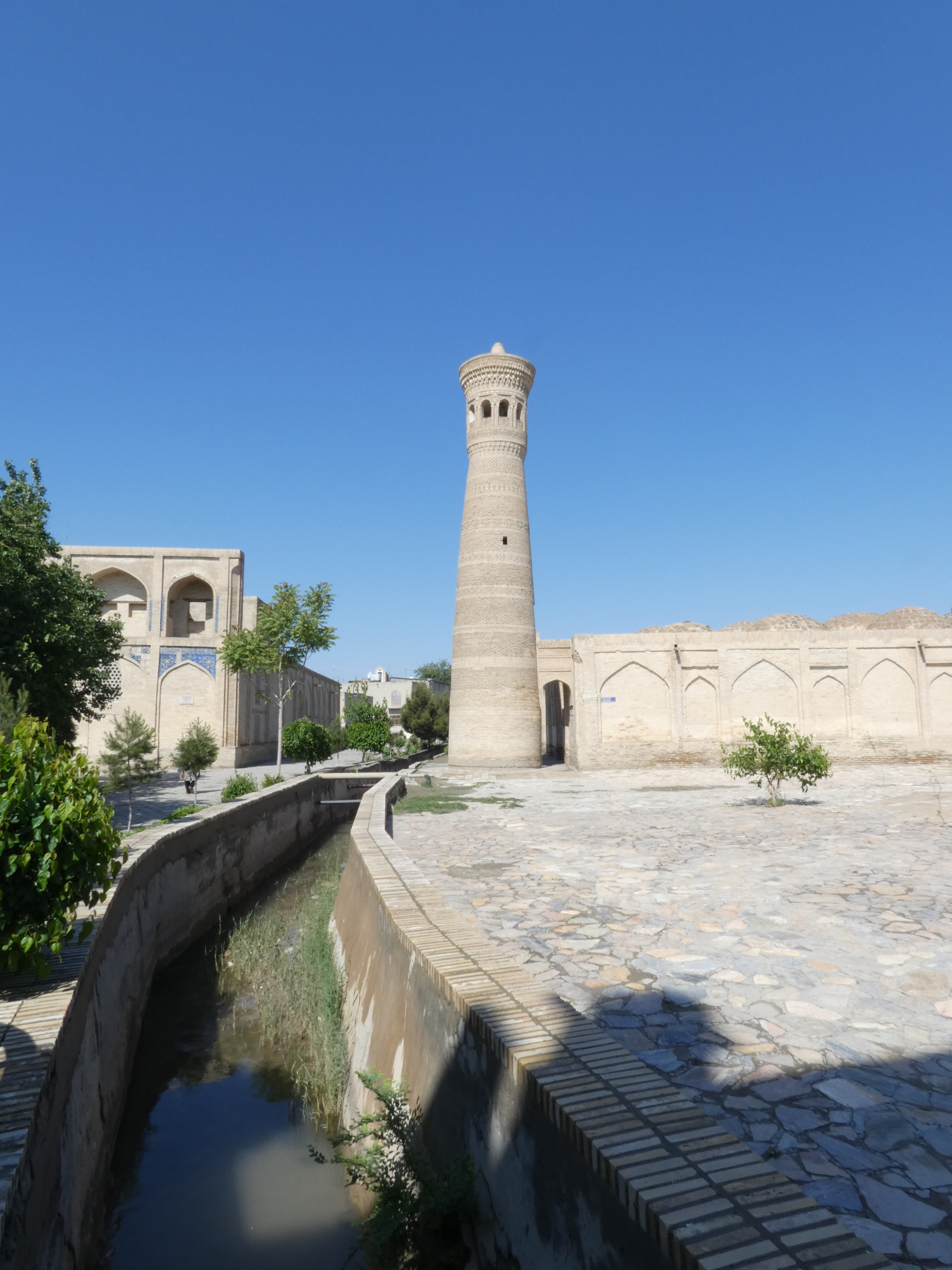 Minarett des Komplex' Hodscha Gaukuschan, links ein Teil der Medrese, links ein Teil der Moschee, Buchara